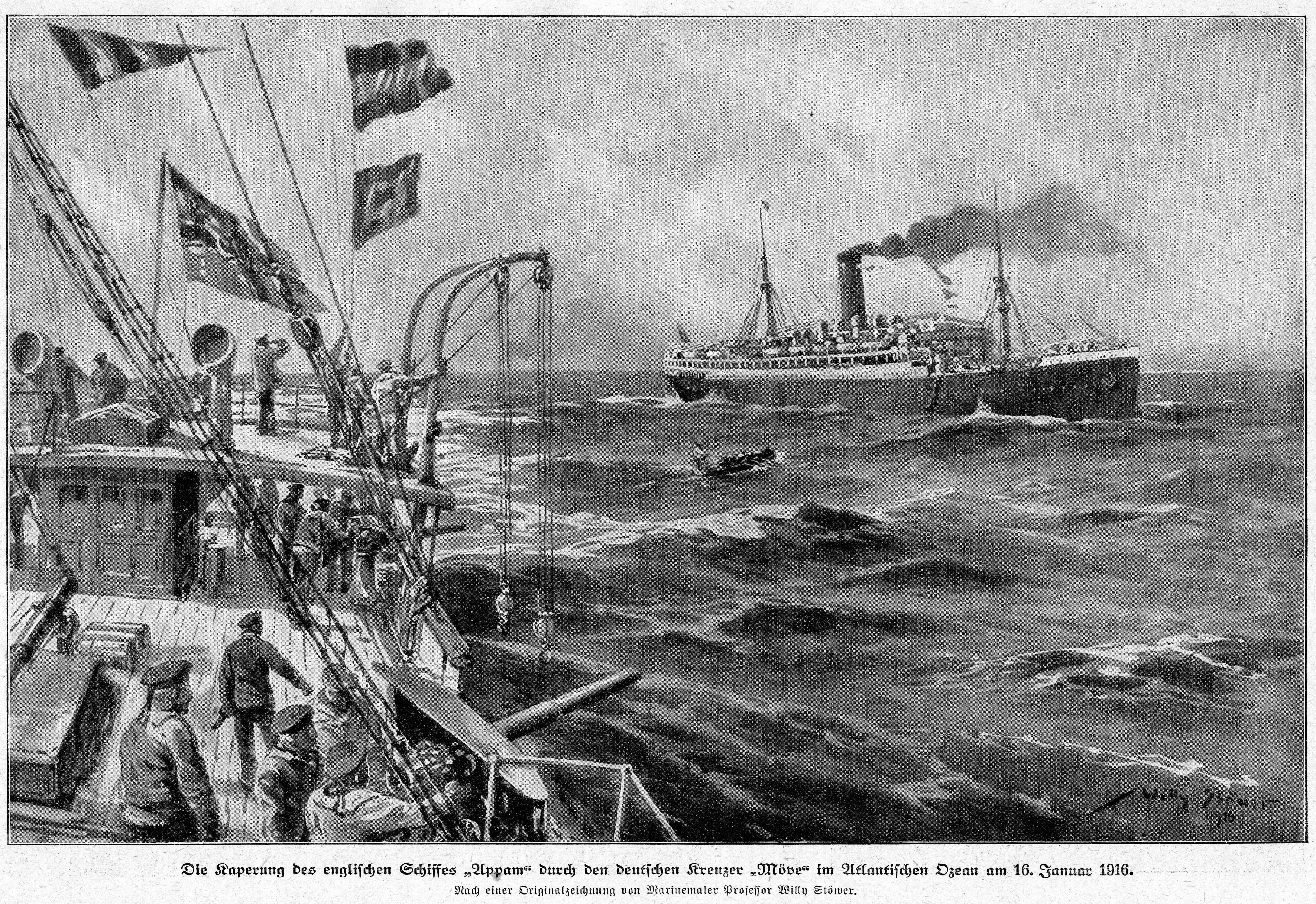 Der Dampfer APPAM wird durch SMS MÖVE gekapert, 16. Januar 1916. Illustration von Willy Stöver, Illustrirte Zeitung 1916